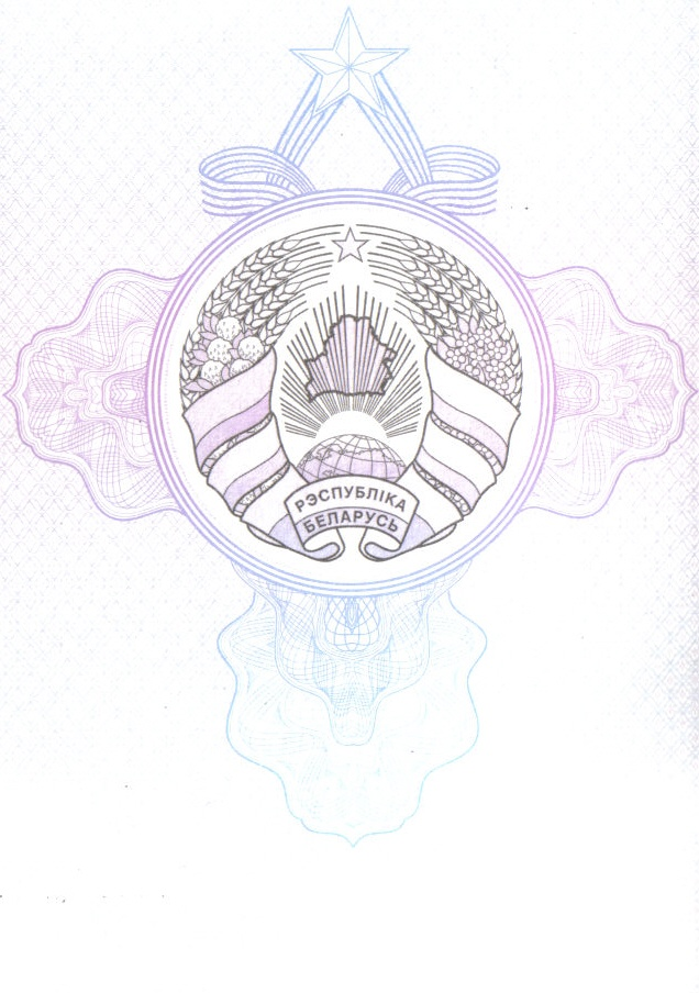 Ваенны квіток. Рэспубліка Беларусь. 2007 год. Першая старонка.